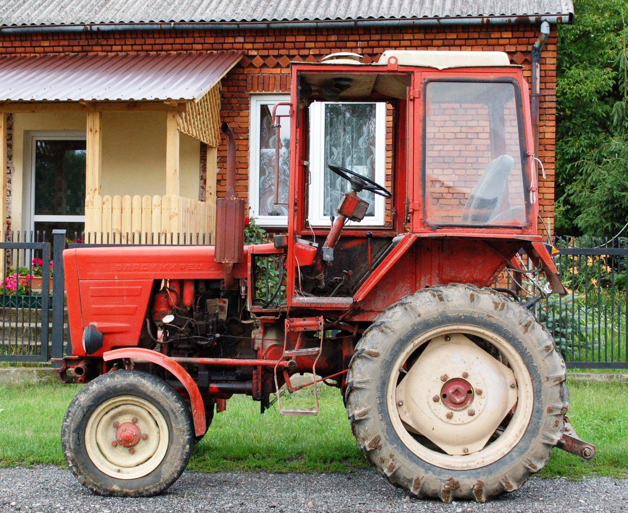 Polen, Traktor aus russischer Fabrikation (?) bei Sanok